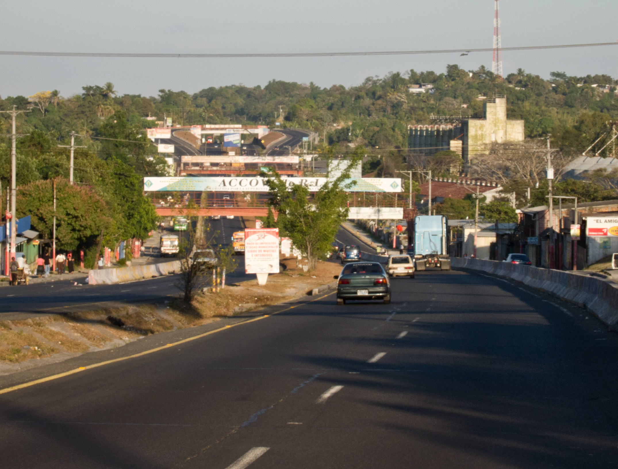 Carretera Panamericana en San Martin, El Salvador